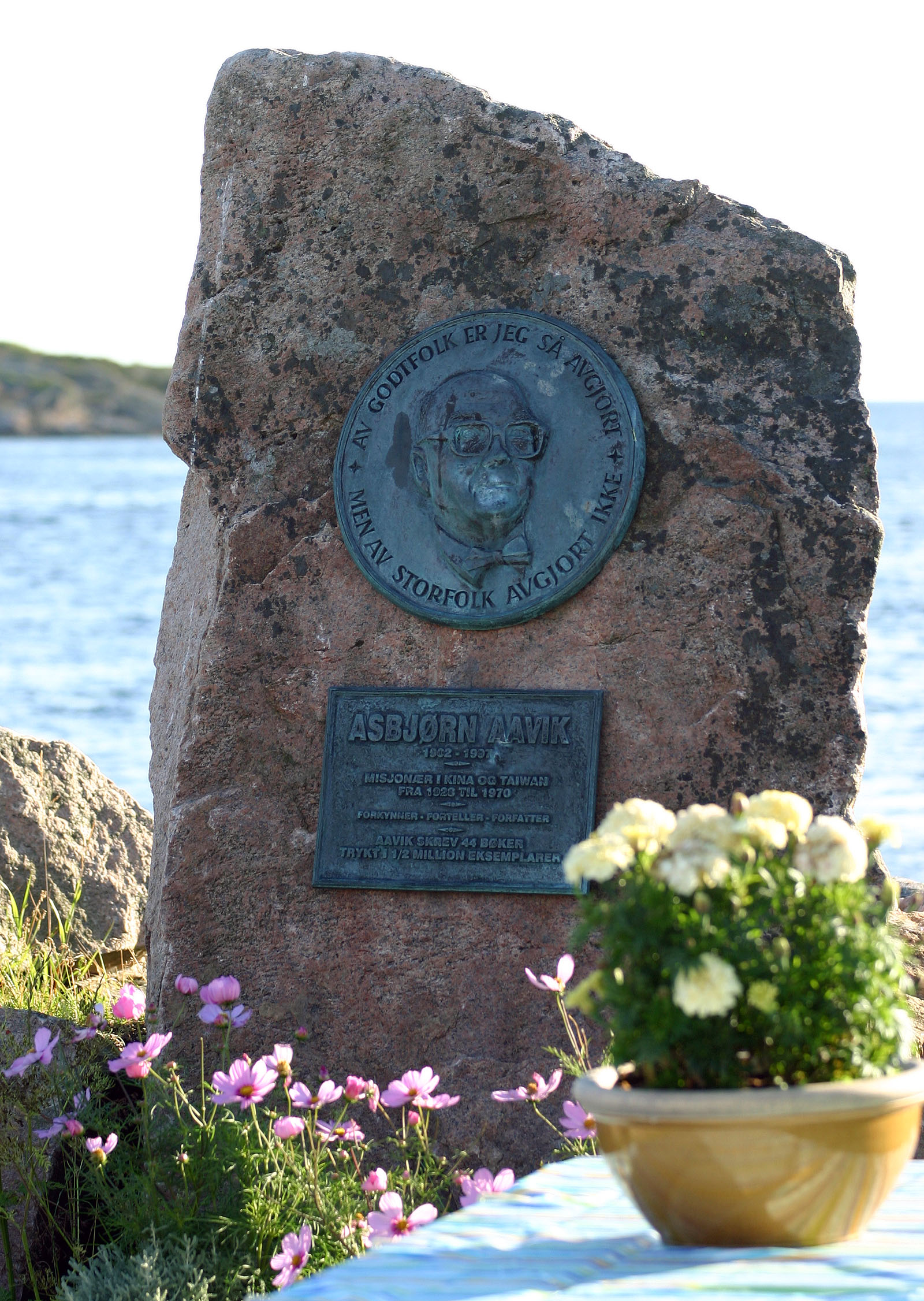 Asbjørn Aavik minneplate i Åvik, Lindesnes kommune